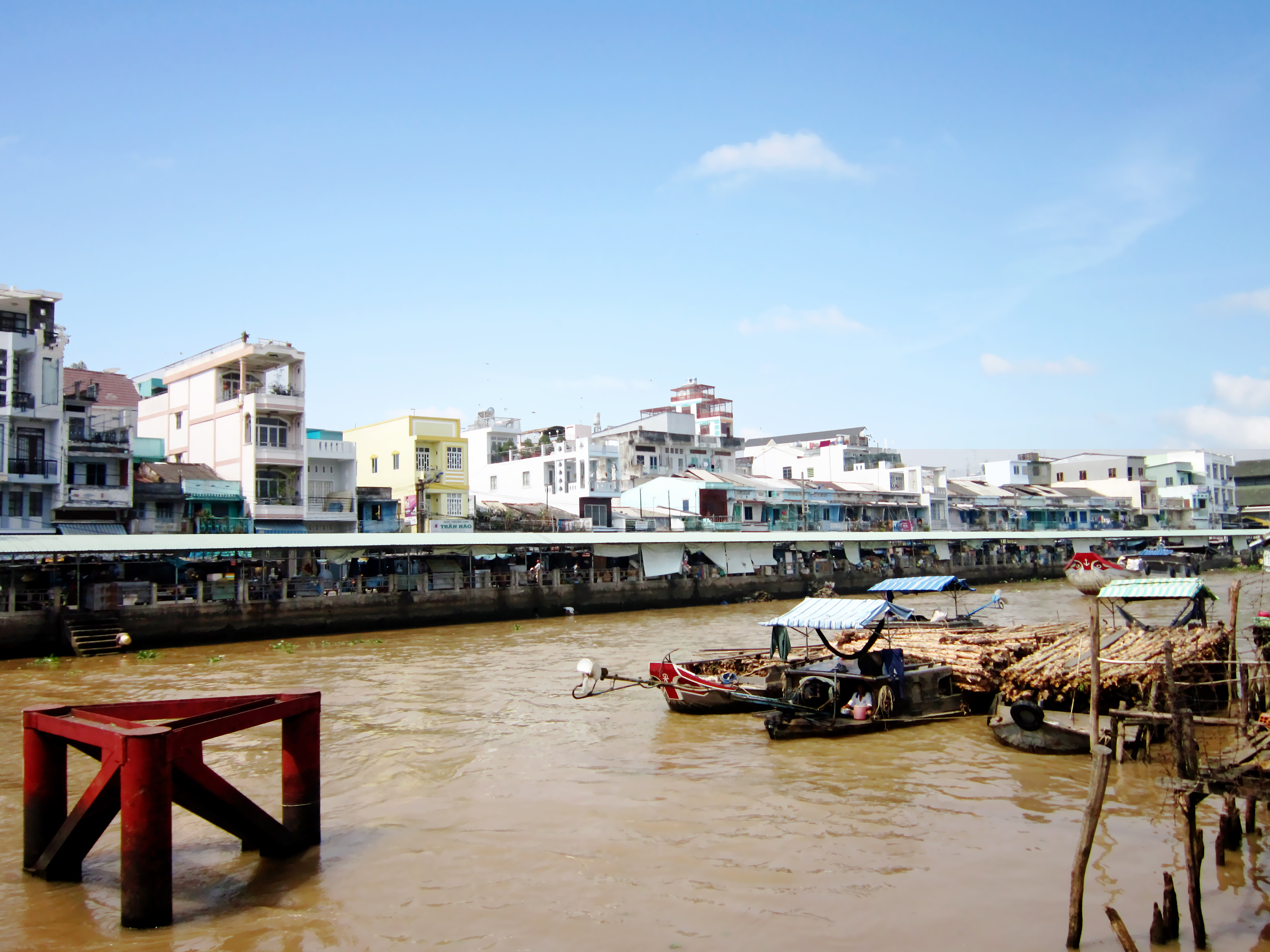 Phố ở phường 2 bên sông Sa Đéc; thuộc TP Sa Đéc, tỉnh Đồng Tháp, Việt Nam.